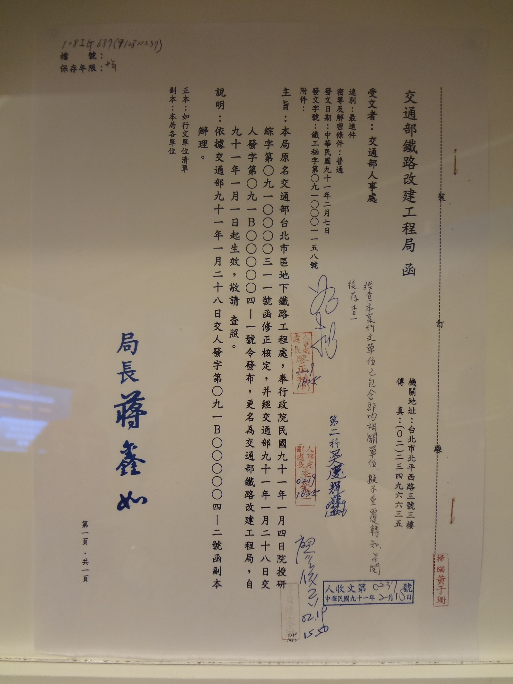 2002年2月7日，交通部鐵路改建工程局「鐵工秘字第0910001158號函」，明定交通部臺北市區地下鐵路工程處自本年1月1日起更名為交通部鐵路改建工程局。